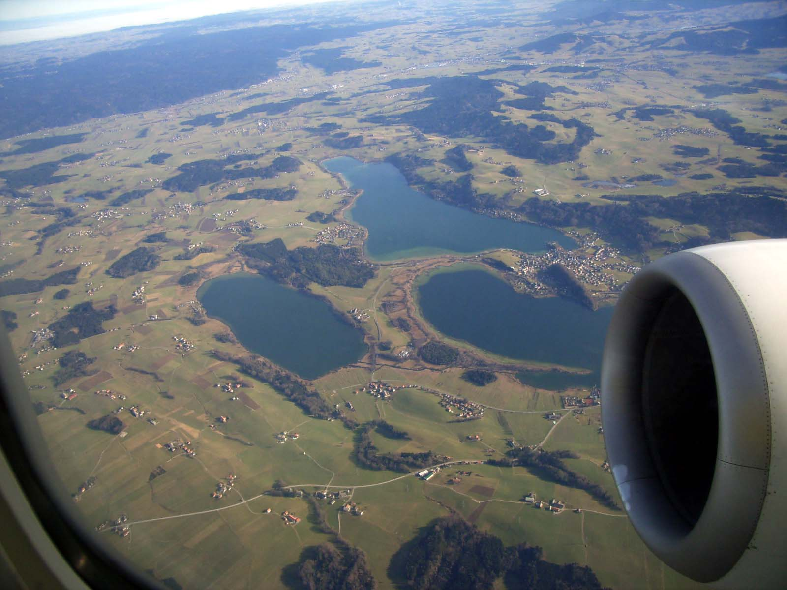 Flug über die Seenplatte mit Blick auf den Mattsee (rechts oben), Obertrumer See (rechts unterhalb des Triebwerks) und Grabensee (links). Die Ortschaft am Ufer des Mattsees ist Mattsee. Fotograf: Heinz-Peter Deska, aufgenommen am 10.01.2005